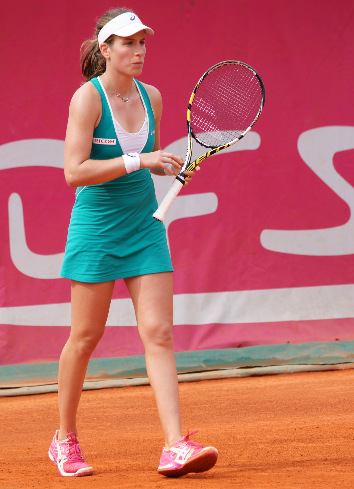 Johanna Konta ITF Cagnes-sur-Mer 2014